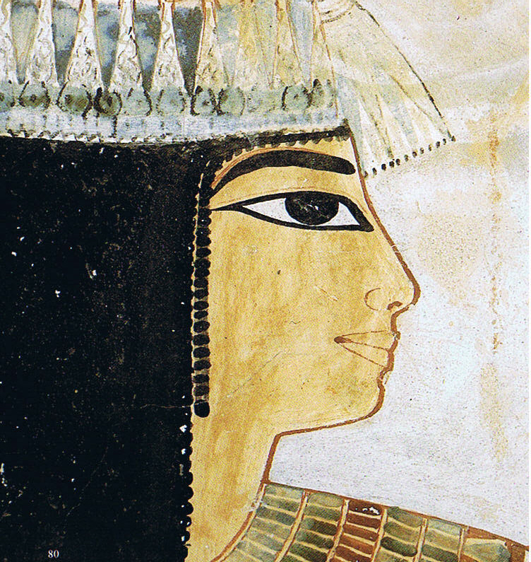 Kopf der Dame Taui